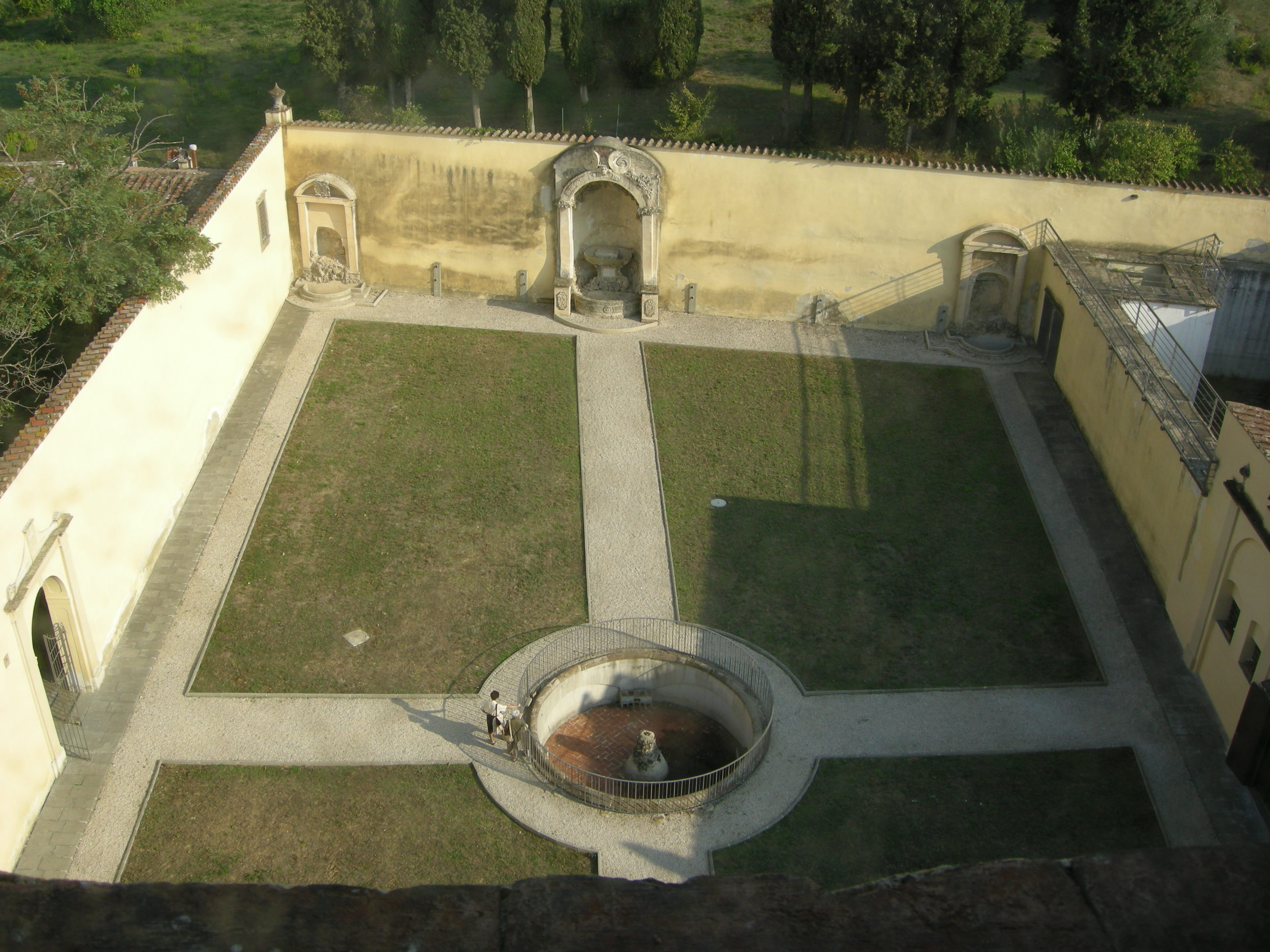 Castello di torregalli, giardino murato